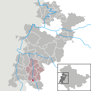 Zella/Rhön in Thuringia - Wartburgkreis